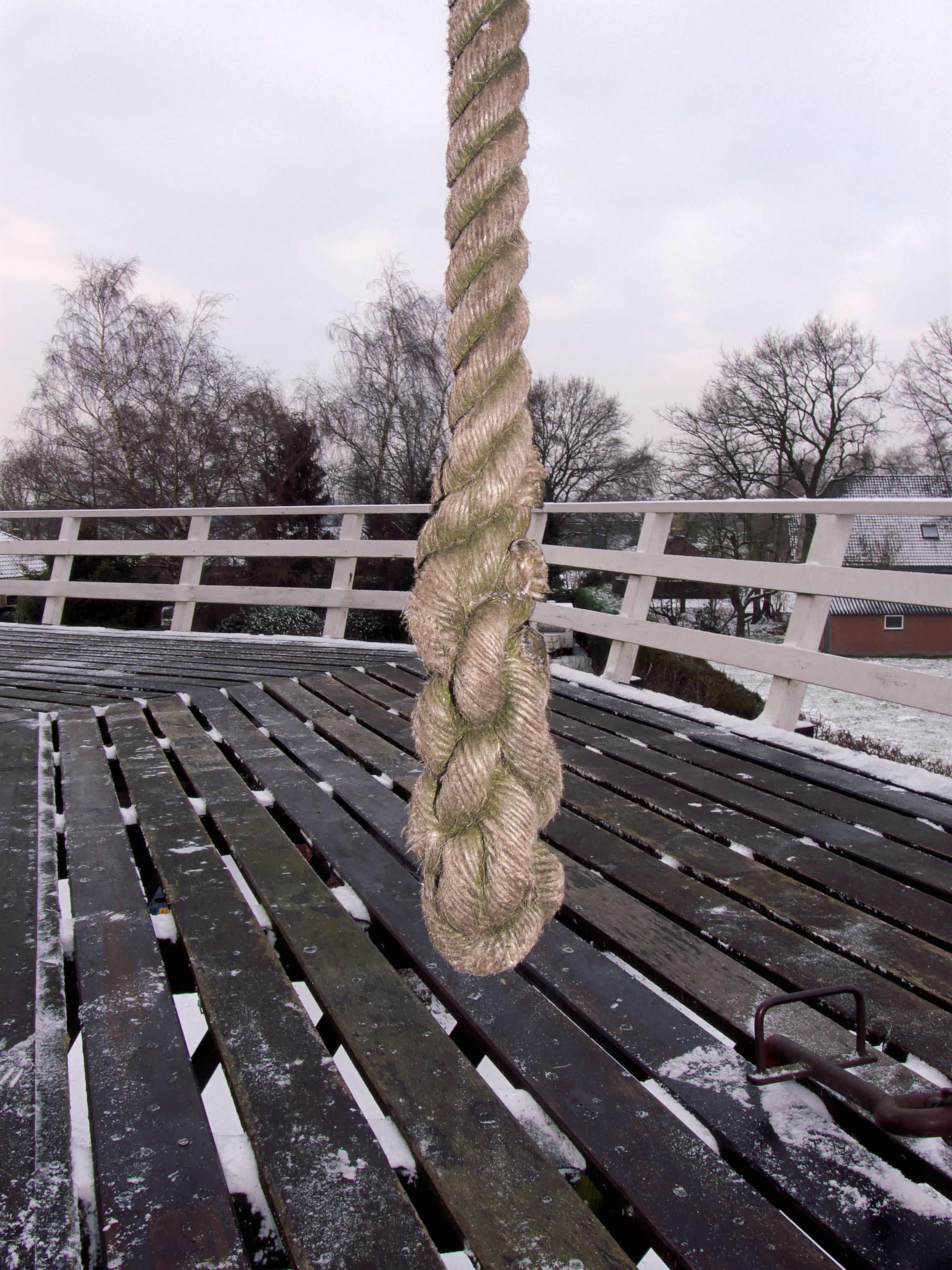 Eindsplits aan vangtouw van Walderveense molen